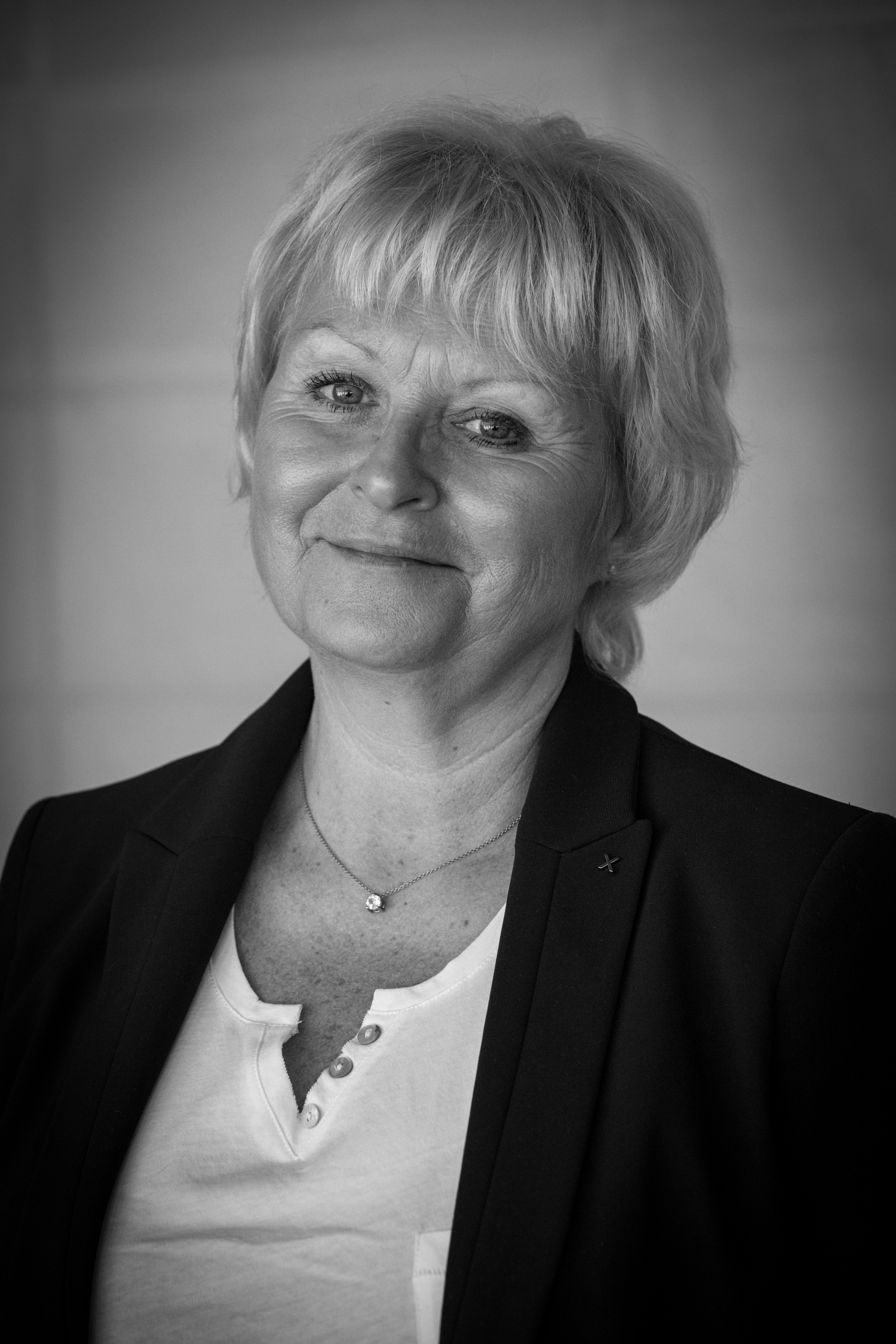 Véronique Mathieu-Houillon, née le 28 octobre 1955 à Nancy, est une femme politique française, députée européenne élue dans la circonscription Est, investie par l'UMP, siégeant au groupe PPE-DE, devenu groupe PPE. Conseillère régionale ACAL.